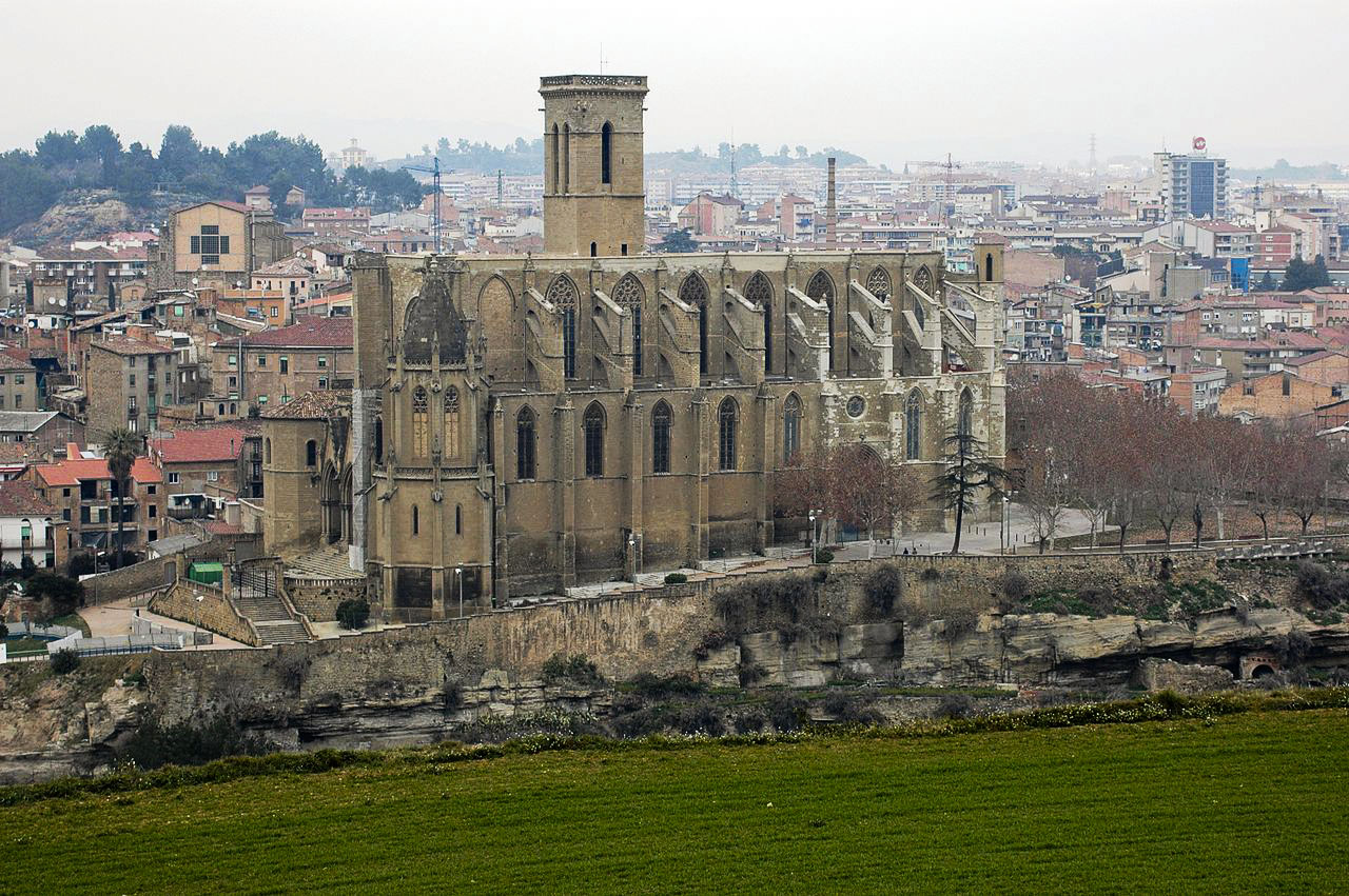 Vista general de la Seu de Manresa